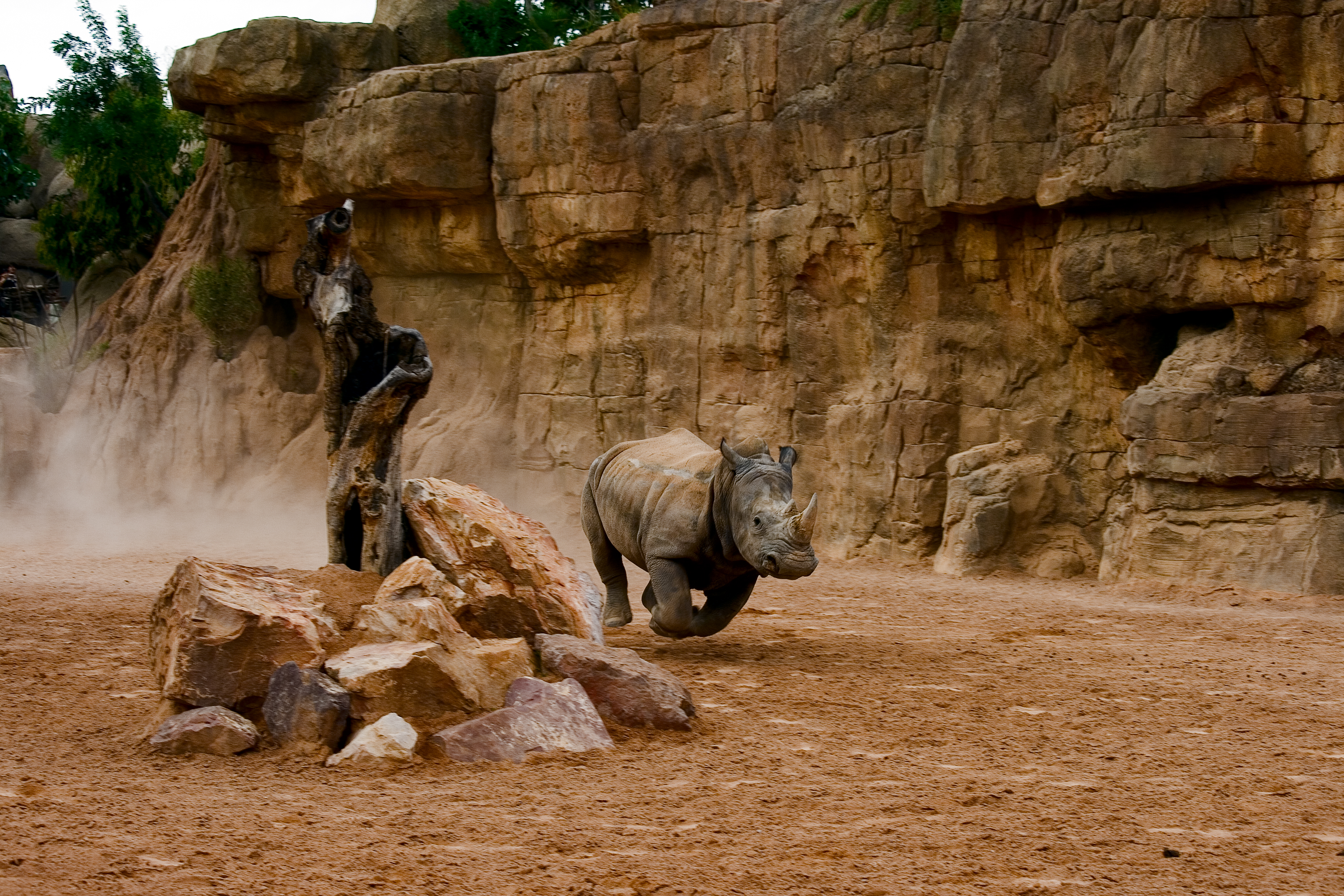 Se puede ver en